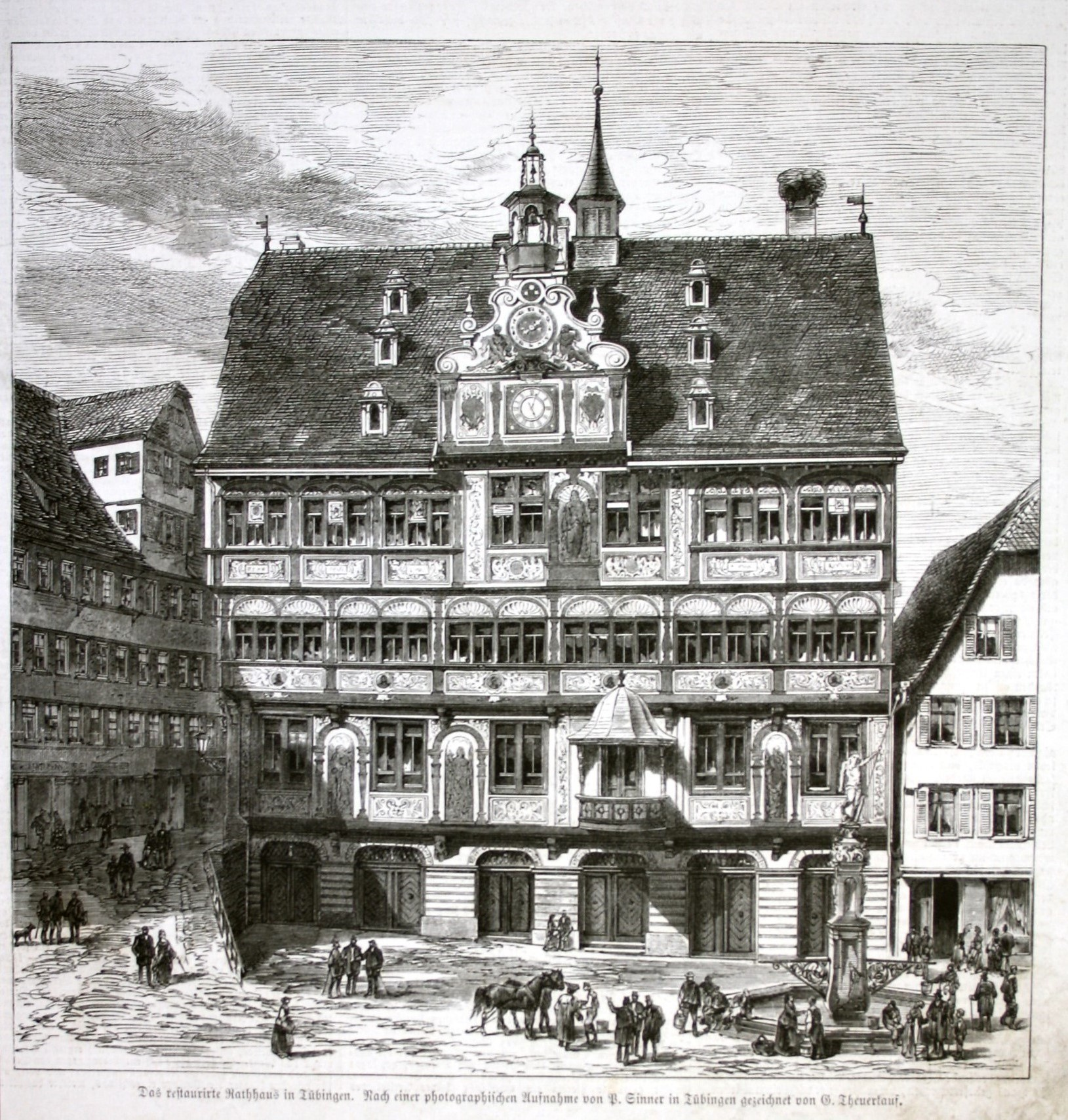 Tübinger Rathaus nach Renovierung (Holzstich nach Fotografie aus Leipziger Illustrirte Zeitung)